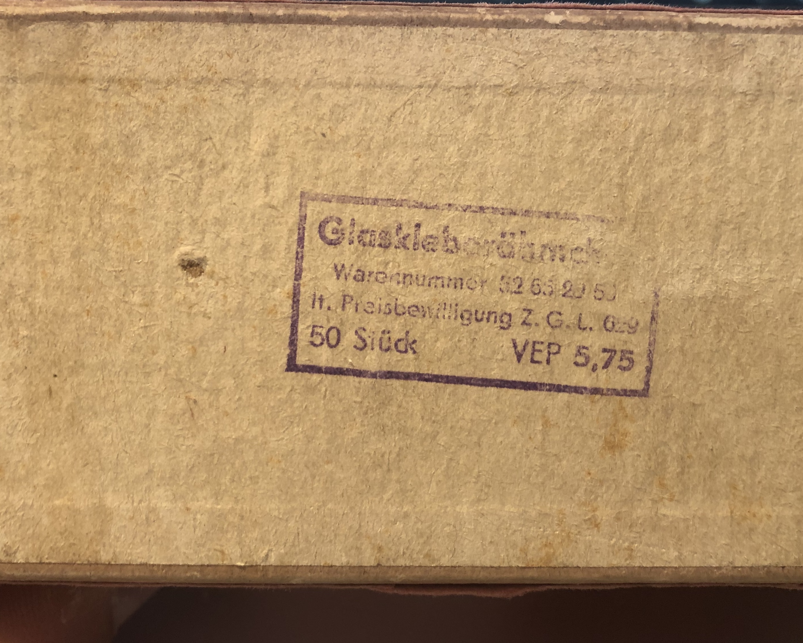 Preisangabe auf einer Verpackung von Diarahmen